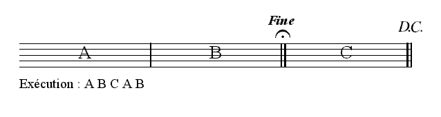 Répétition par "da capo" avec "fine"